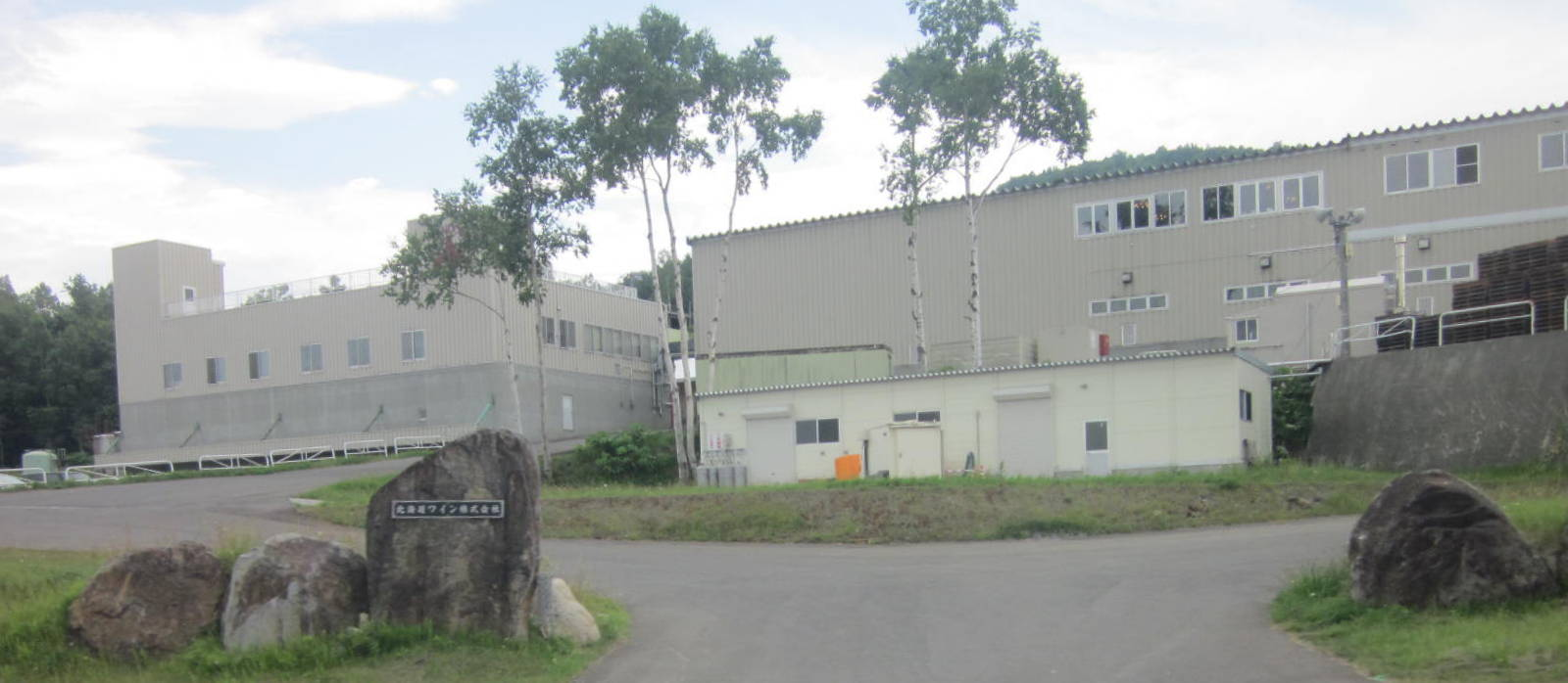 北海道ワイン本社